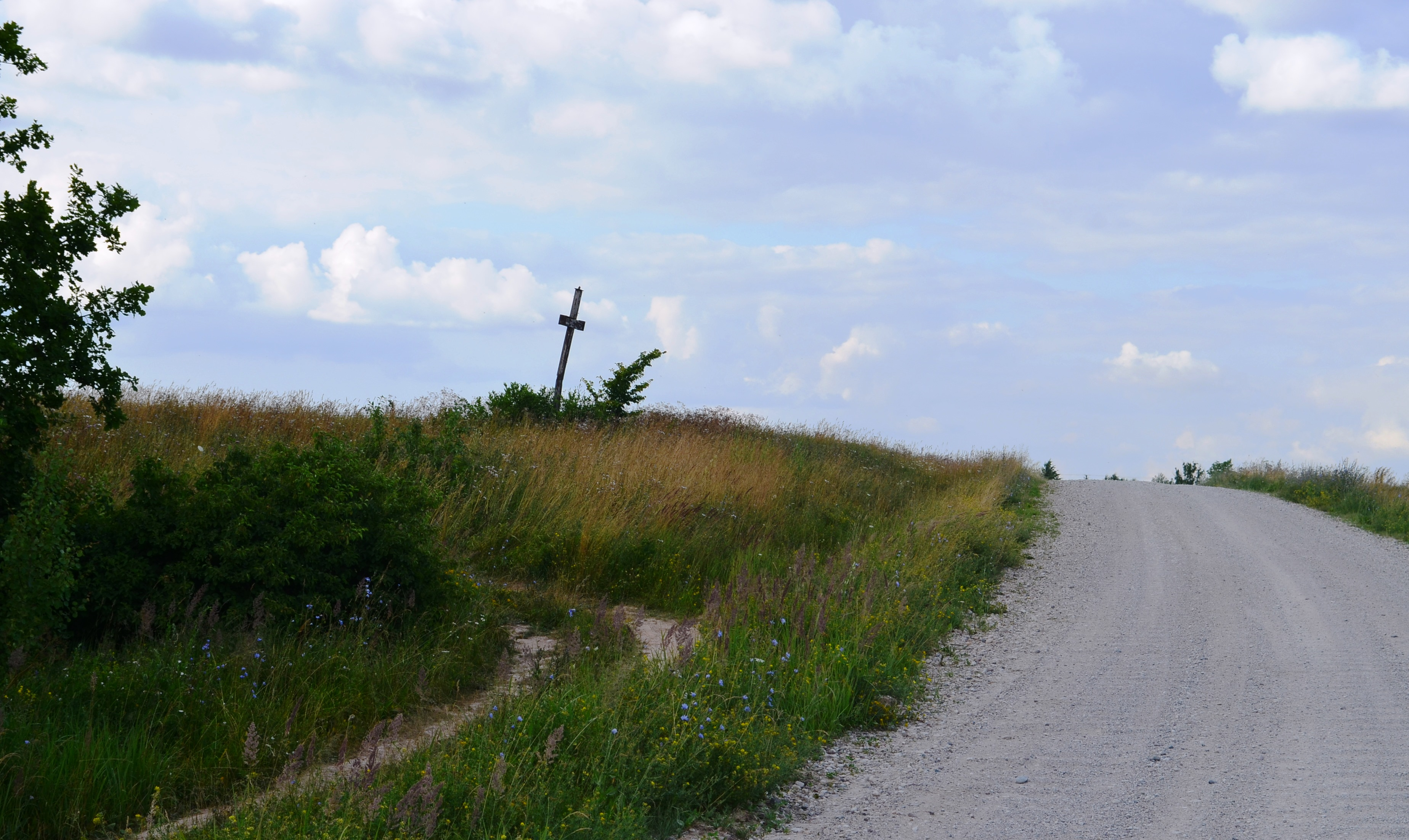 Medinis kryžius ir kelias į Kunionius, Kampai I, Kėdainių raj.